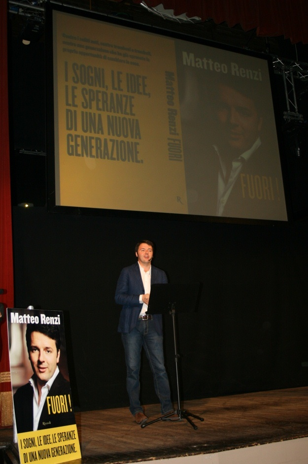 Matteo Renzi presenta il suo libro "Fuori!" al Teatro Verdi di Cesena.